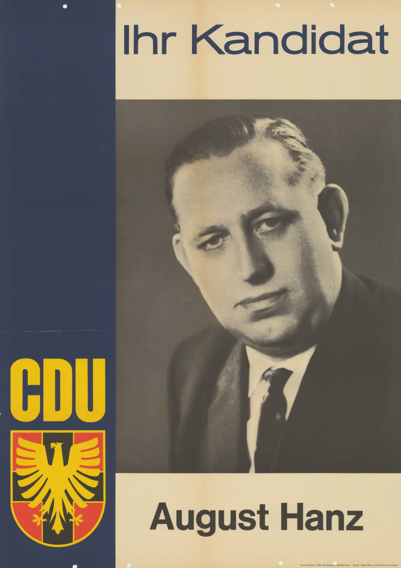 Ihr Kandidat CDU August Hanz Abbildung: Porträtfoto Kommentar: Rückseitig farbig beschriftet. Plakatart: Kandidaten-/Personenplakat mit Porträt Auftraggeber: Verantw.: CDU-Bundesgeschäftsstelle Bonn Drucker_Druckart_Druckort: Repro-Druck, Schmiden bei Stuttgart Objekt-Signatur: 10-010 : 202 Bestand: Landtagswahlplakate Rheinland-Pfalz (10-010) GliederungBestand10-18: Landtagswahlplakate Rheinland-Pfalz (10-010) » CDU Lizenz: KAS/ACDP 10-010 : 202 CC-BY-SA 3.0 DE